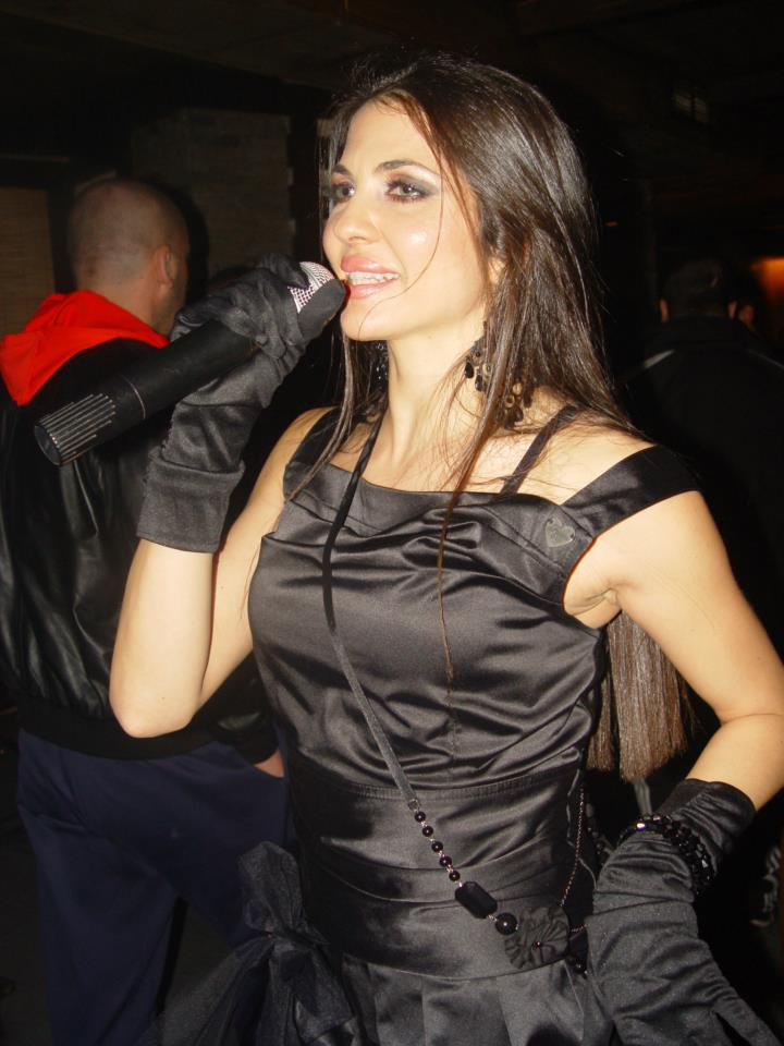 no desc